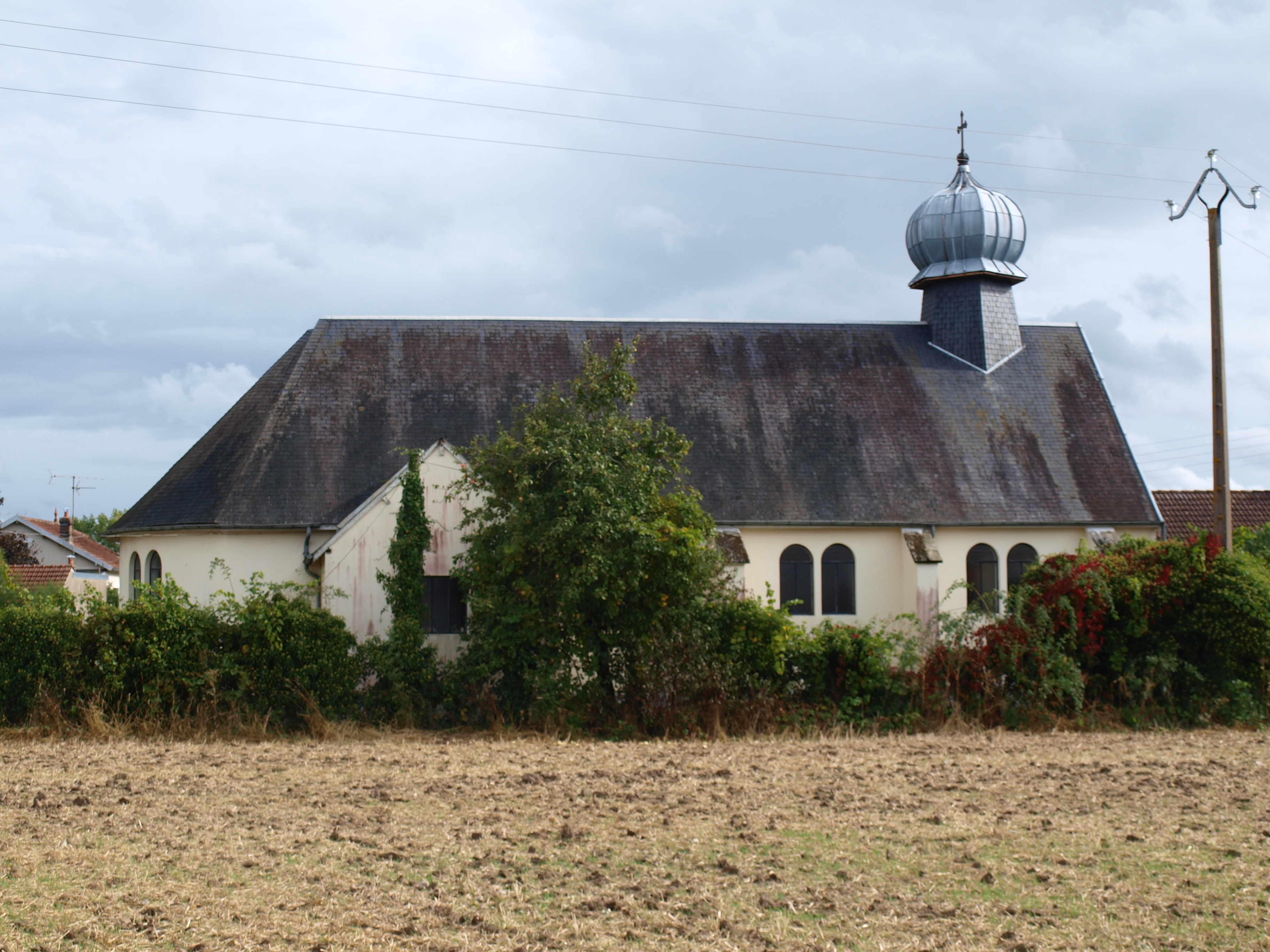 Église ukrainienne Sainte-Olga à Corquilleroy (Loiret; France)